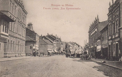 Srpski (latinica): Pravitelstvena ulica, Ulica gospodara Jevrema, Glavna ulica, početak XX veka, Šabac